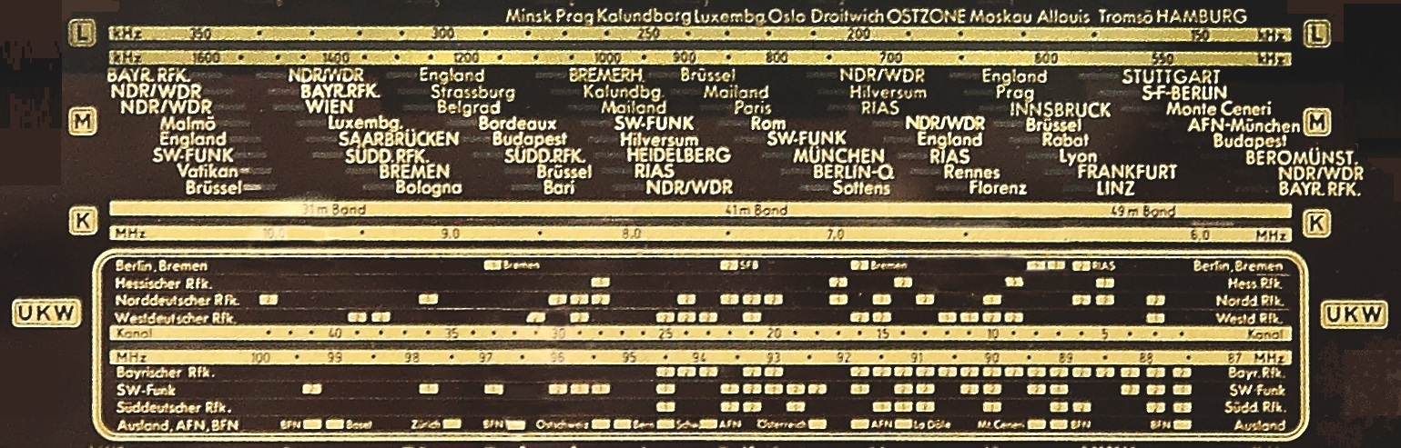 Skala des Radioempfängers Nordmende Tannhäuser 57 3D von 1956